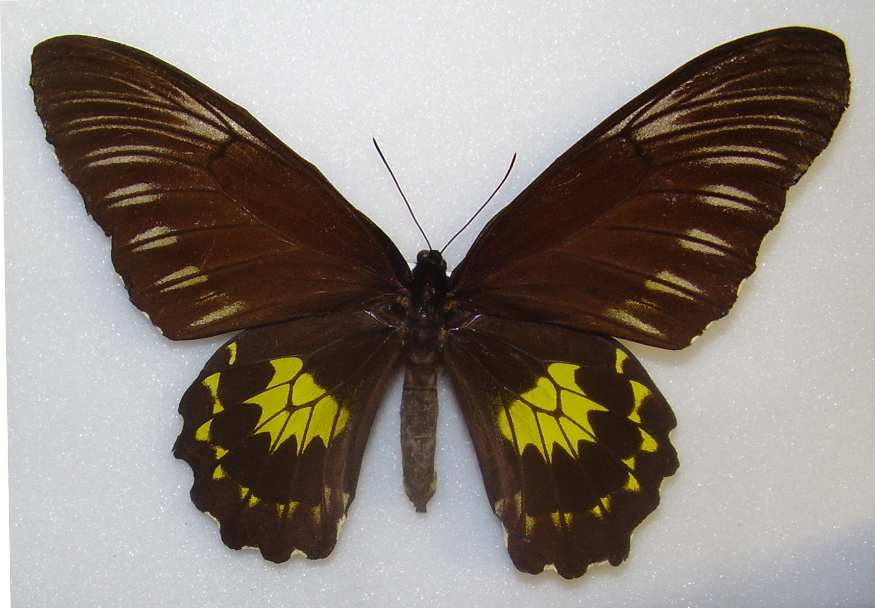 Troides miranda neomiranda Female, upperside.West Sumatra March 2007